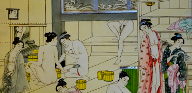 Sento Senovės Japonijoje